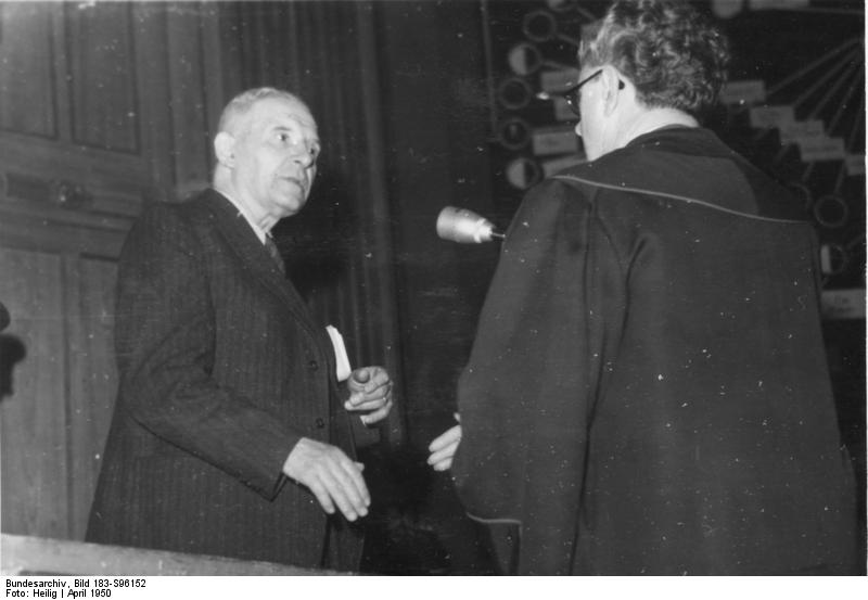 Dessau, Herwegen-Prozeß ADN-ZB/Illus - Heilig Beginn des Dessauer Millionenschieber-Prozesses. Am 24. April 1950 begann vor dem ersten Strafsenat des Obersten Gerichts der Deutschen Demokratischen Republik der Prozess gegen den ehemaligen Minister für Arbeit und Sozialwesen von Sachsen-Anhalt, Herwegen, und seine Mitangeklagten. Die Verhandlungen, die unter starker Teilnahme der werktätigen Bevölkerung im Landestheater Dessau stattfinden werden von der Vizepräsidentin des Obersten Gerichtshofes, Hilde Benjamin, geführt. Dr. Leo Herwegen, ehem. Minister für Arbeit und Sozialwesen in Sachsen Anhalt; Prof. Dr. Willi Brundert, ehem. stellvertretender Wirtschaftsminister von Sachsen-Anhalt; Dipl.-Ing. Hermann Müller, ehem. Direktor der Deutschen Continentalen Gasgesellschaft in Dessau; Dr. Leopold Kaatz, ehem. Direktor der Dessauer Zuckerraffinerie und Präsident der Industrie und Handelskammer in Dessau; Ernst Simon, ehem. Landgerichtsdirektor in Dessau und später juristischer Hilfsarbeiter der Deutschen Continentalen Gasgesellschaft; Paul Heil, ehem. Rechtsanwalt und Notar; Ernst Pauli, ehem. Wirtschaftsbeauftragter beim Oberbürgermeister der Stadt Dessau und gleichzeitig Leiter der Abteilung Industrie bei der Industrie und Handelskammer in Dessau; Heinrich Scharf, ehem. Mitglied des Direktoriums der Landeskreditbank Sachsen-Anhalt, werden angeklagt, die Überführung des Konzerns der Deutschen Continentalen Gasgesellschaft in das Eigentum des Deutschen Volkes planmäßig sabotiert zu haben. Gegen den ehem. Direktor der Deutsche Continentalen Gasgesellschaft Friedrich Methfessel, der sich durch die Flucht nach Westdeutschland vorläufig der Verantwortung entzogen hat, wird in Abwesenheit verhandelt. Schlussphase und Urteilsverkündung im Herwegen Prozeß UBz: Der Angeklagte Simon mit seinem Verteidiger 01.05.50 6318-50 [Urteilsverkündung war am 29.4.1950.]